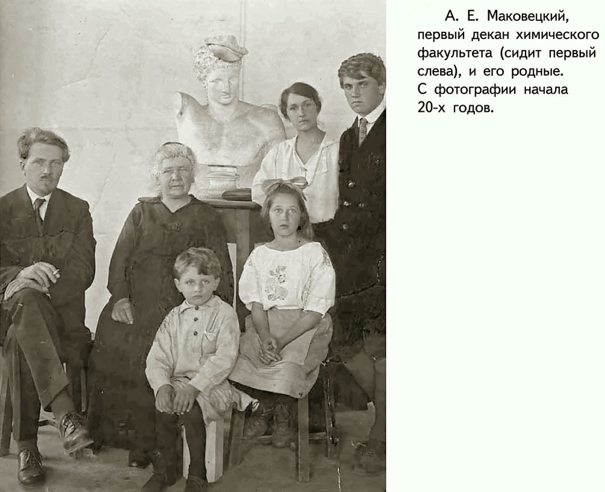 Александр Евменьевич Маковецкий (1880—1939), первый декан химического факультета УрГУ (сидит первый слева) с семьёй